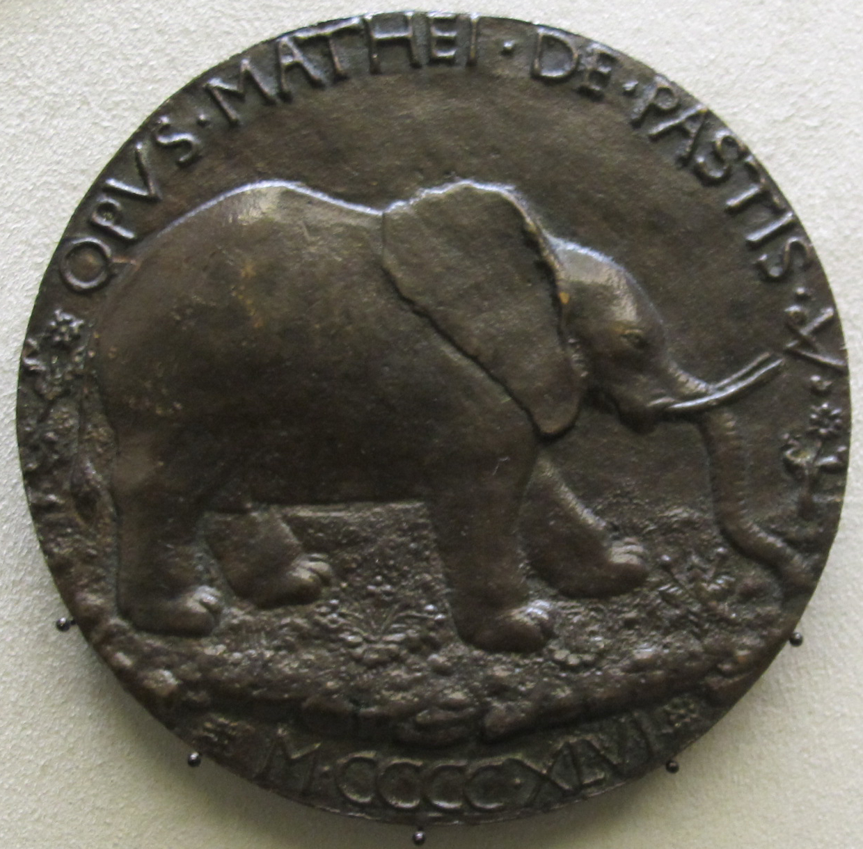 Matteo de' pasti, medaglia di isotta degli atti, 1446 verso